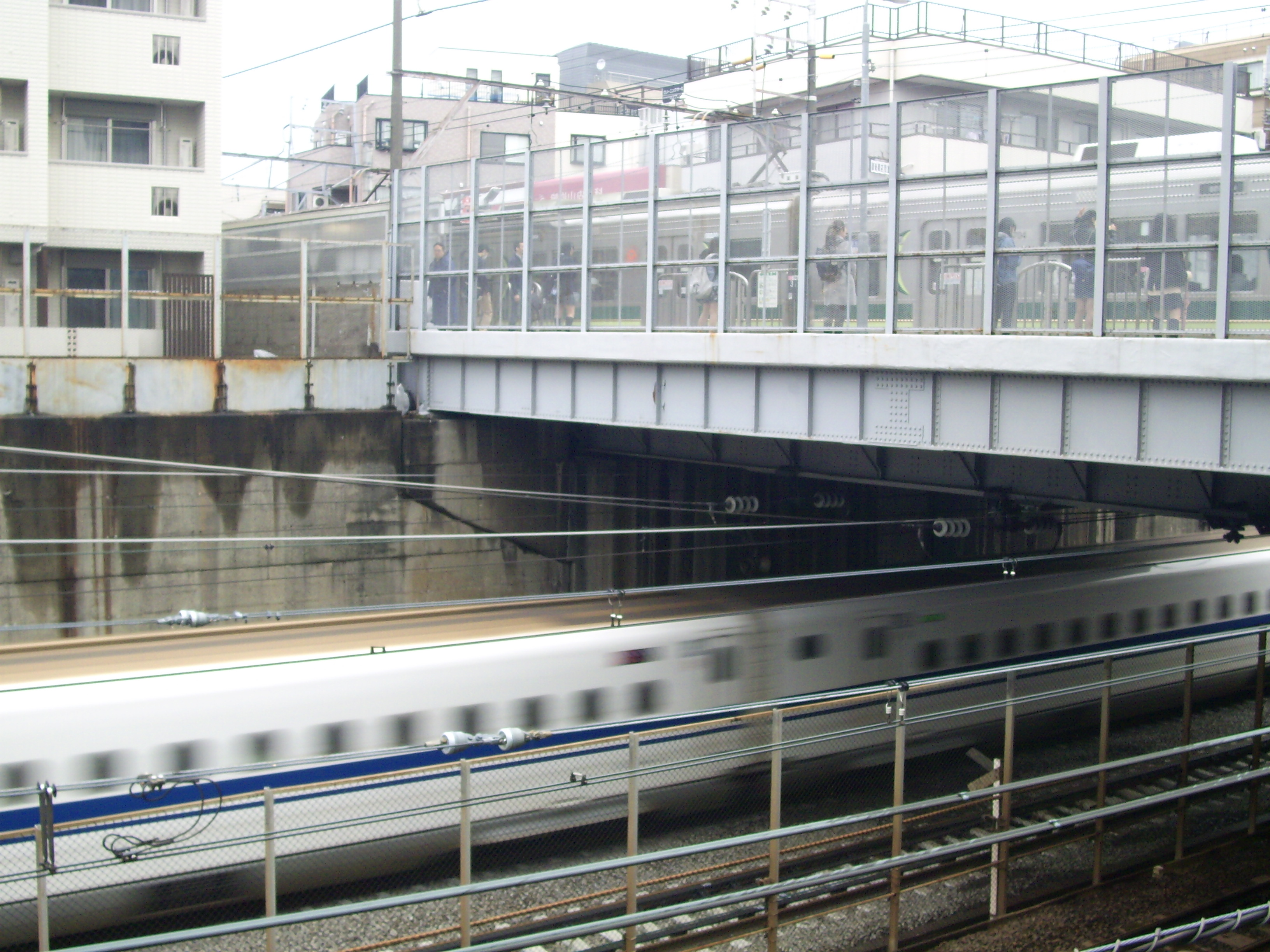 東急池上線御嶽山駅ホーム下を通過する東海道新幹線（跨線橋） ㊟カメラを起動すると日付機能が出荷時のものに初期化されるため、ファイル履歴の撮影・投稿日時とメタデータの原画像データの生成日時が異なります